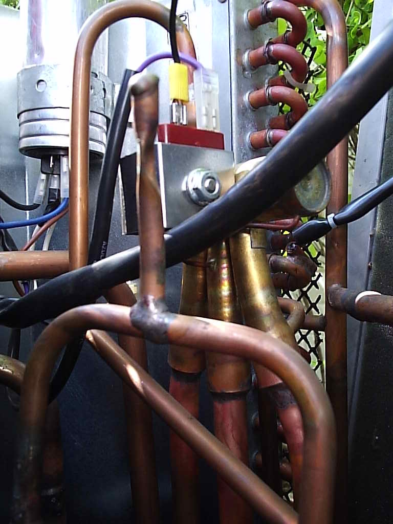 Válvula inversora de flujo (o válvula de 4 vías) al interior de equipo tipo split bomba de calor de 22.000 BTU